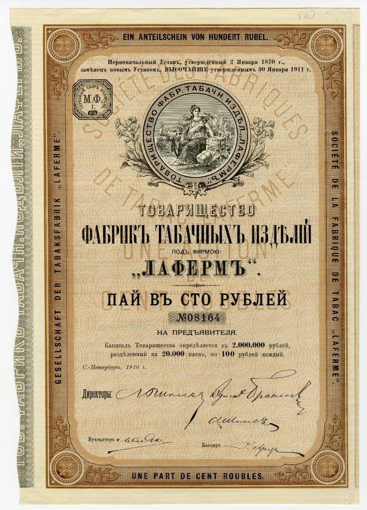 Пай в 100 руб. на предъявителя Товарищества фабрик табачных изделий под фирмою "Лаферм". С.-Петербург, 1910 г.